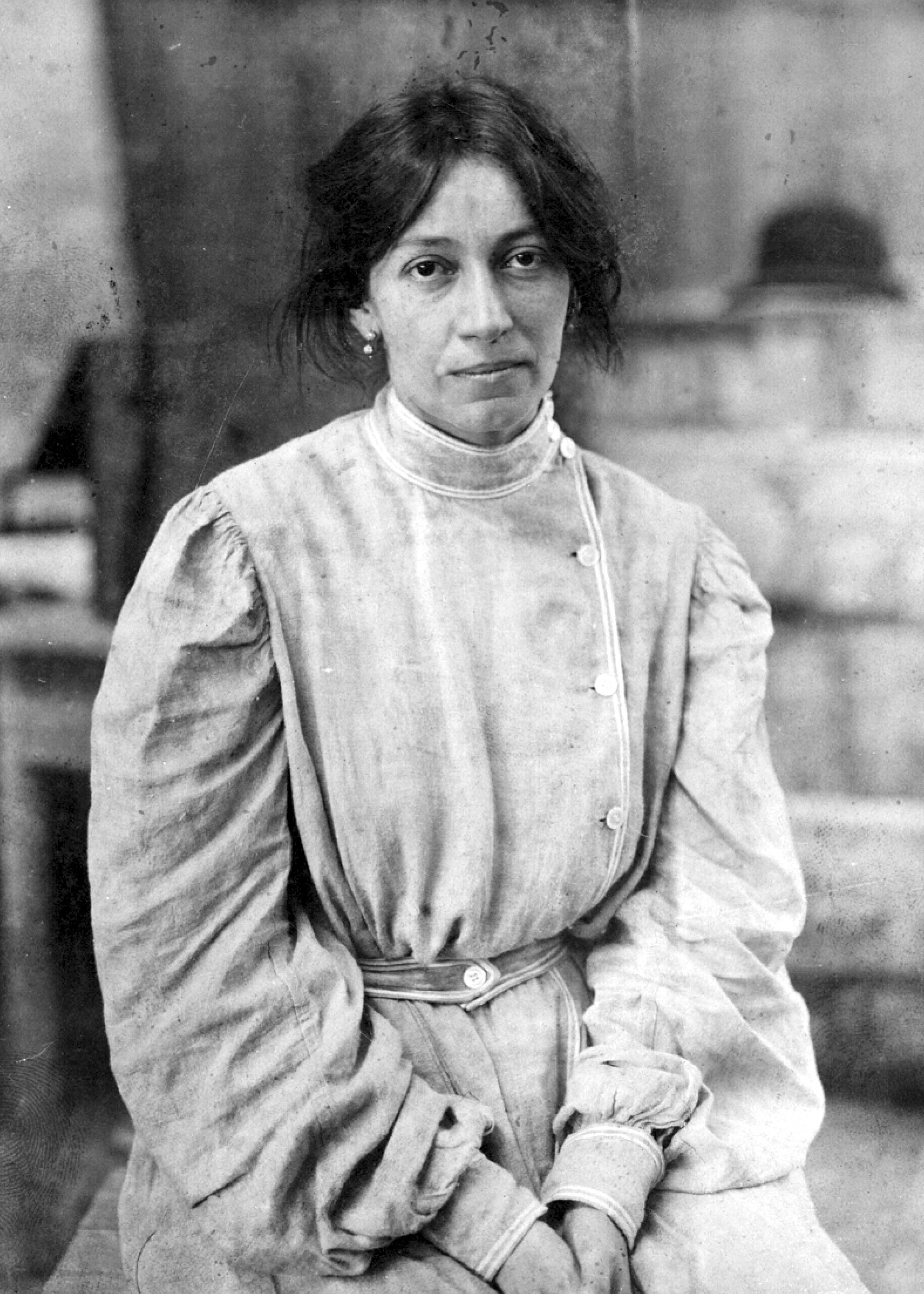 La escultora Lola Mora con su vestimenta de trabajo, en su taller provisorio instalado en el Paseo de Julio, Buenos Aires, enero de 1903.